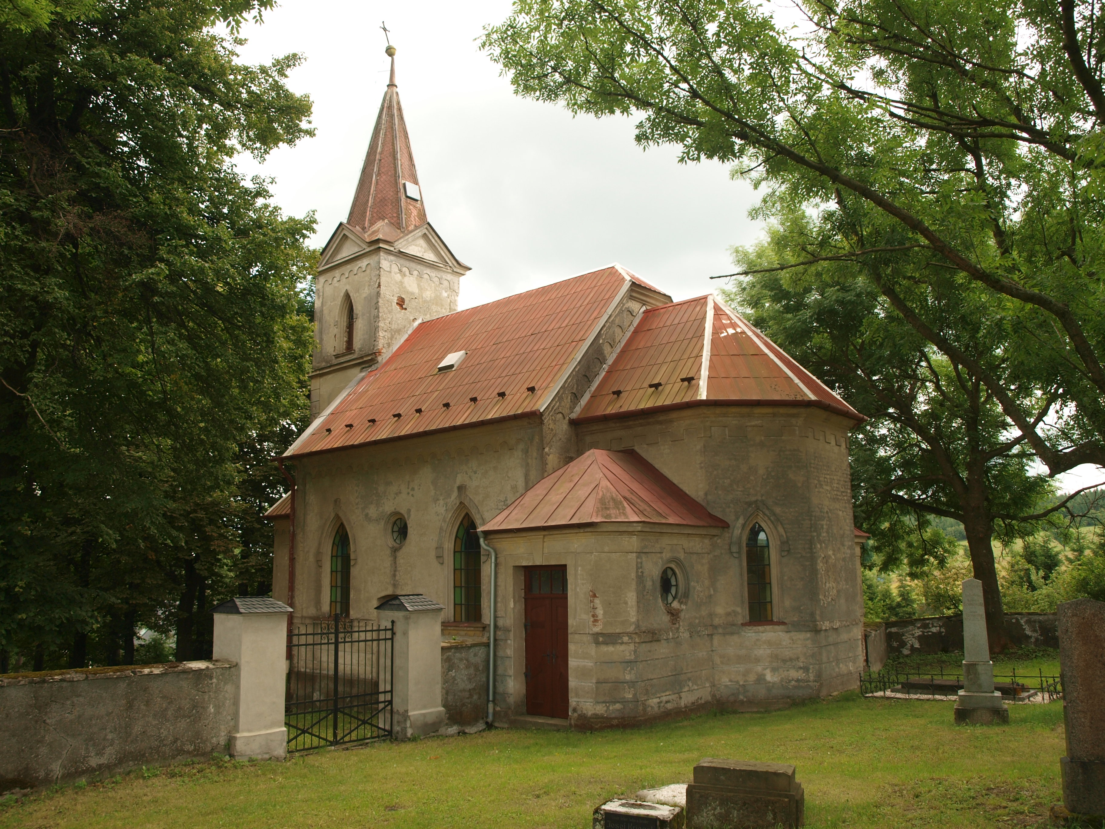 Kostel sv. Jana Křtitele v Kněžpoli